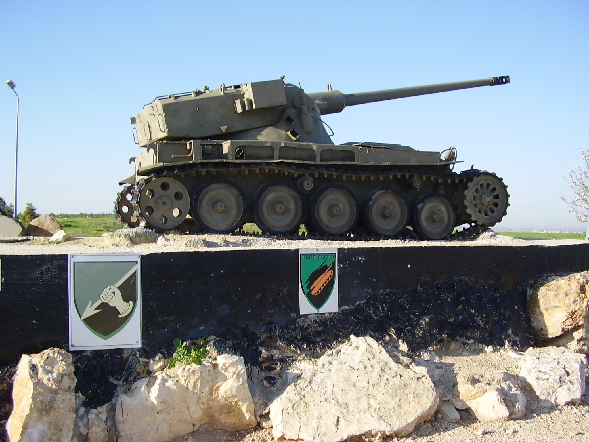 טנק AMX-13 באנדרטת אגרוף ורומח